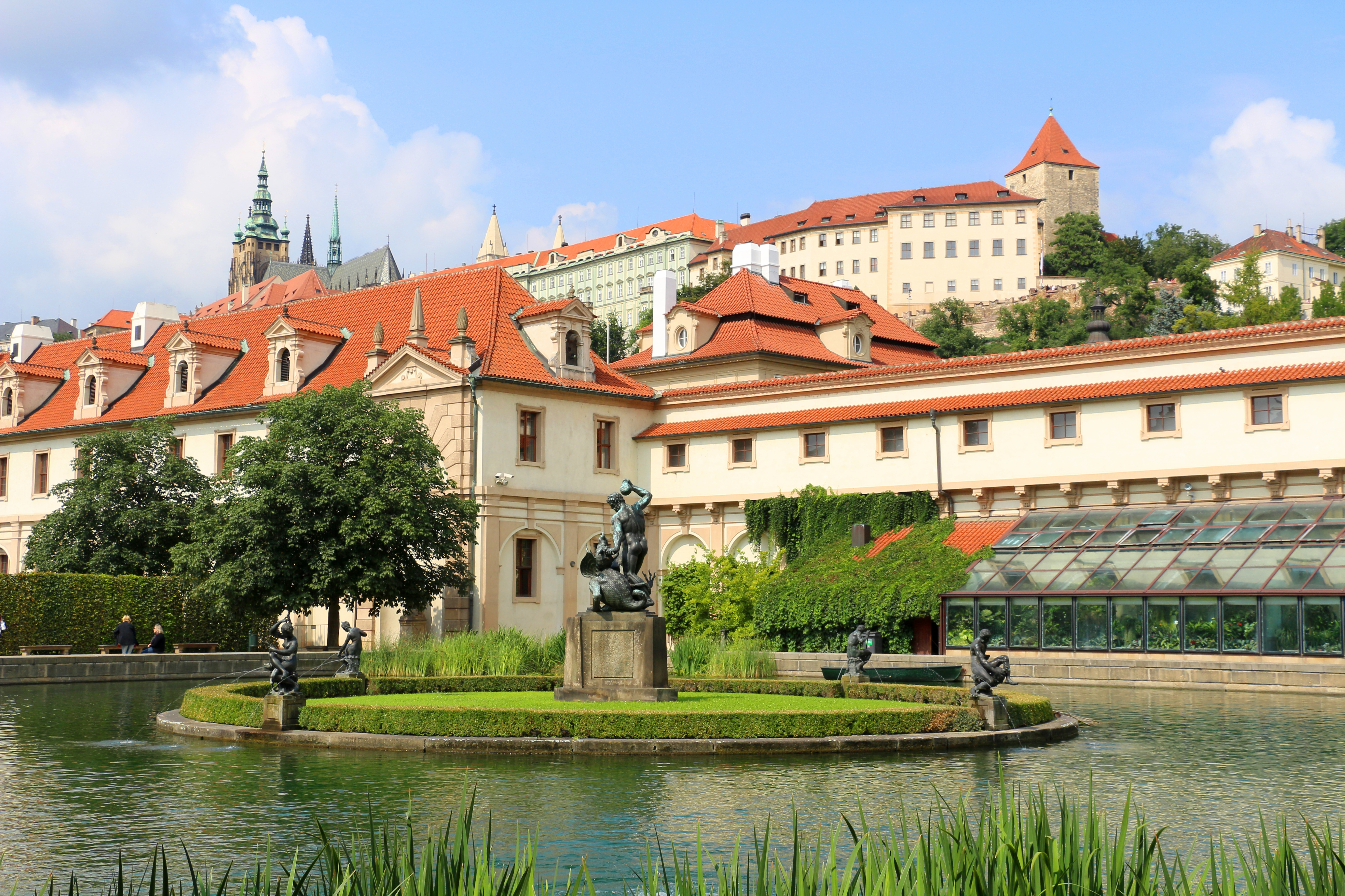 Gewächshaus des Wallensteinpalais